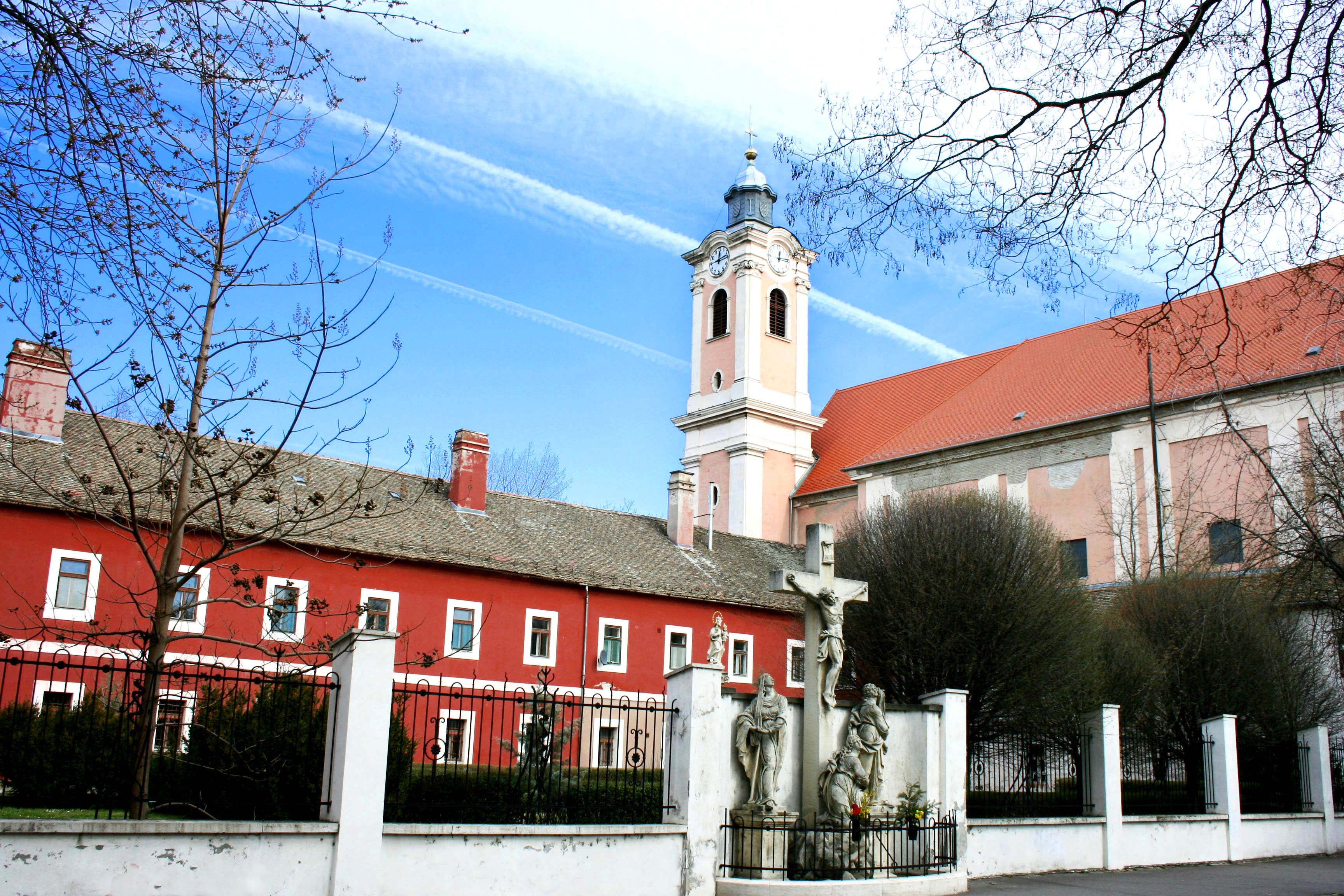 Szegedi Szent Miklós-plébánia (Felsőváros)